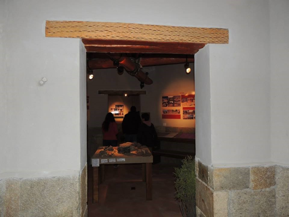 Sala del Museo de Barranca Larga, Valle El Bolsón